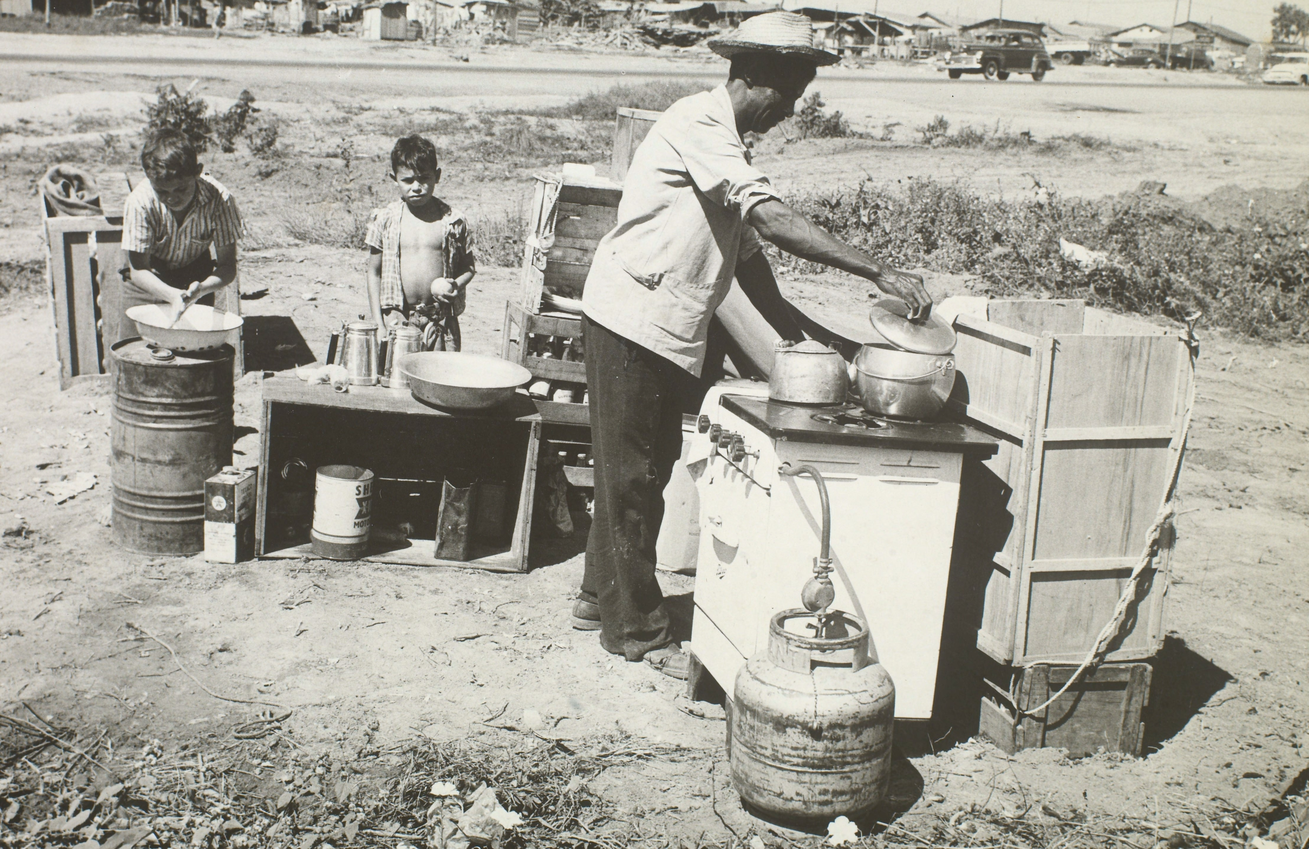 Fotografia do Fundo Correio da Manhã, sob a guarda do Arquivo Nacional.